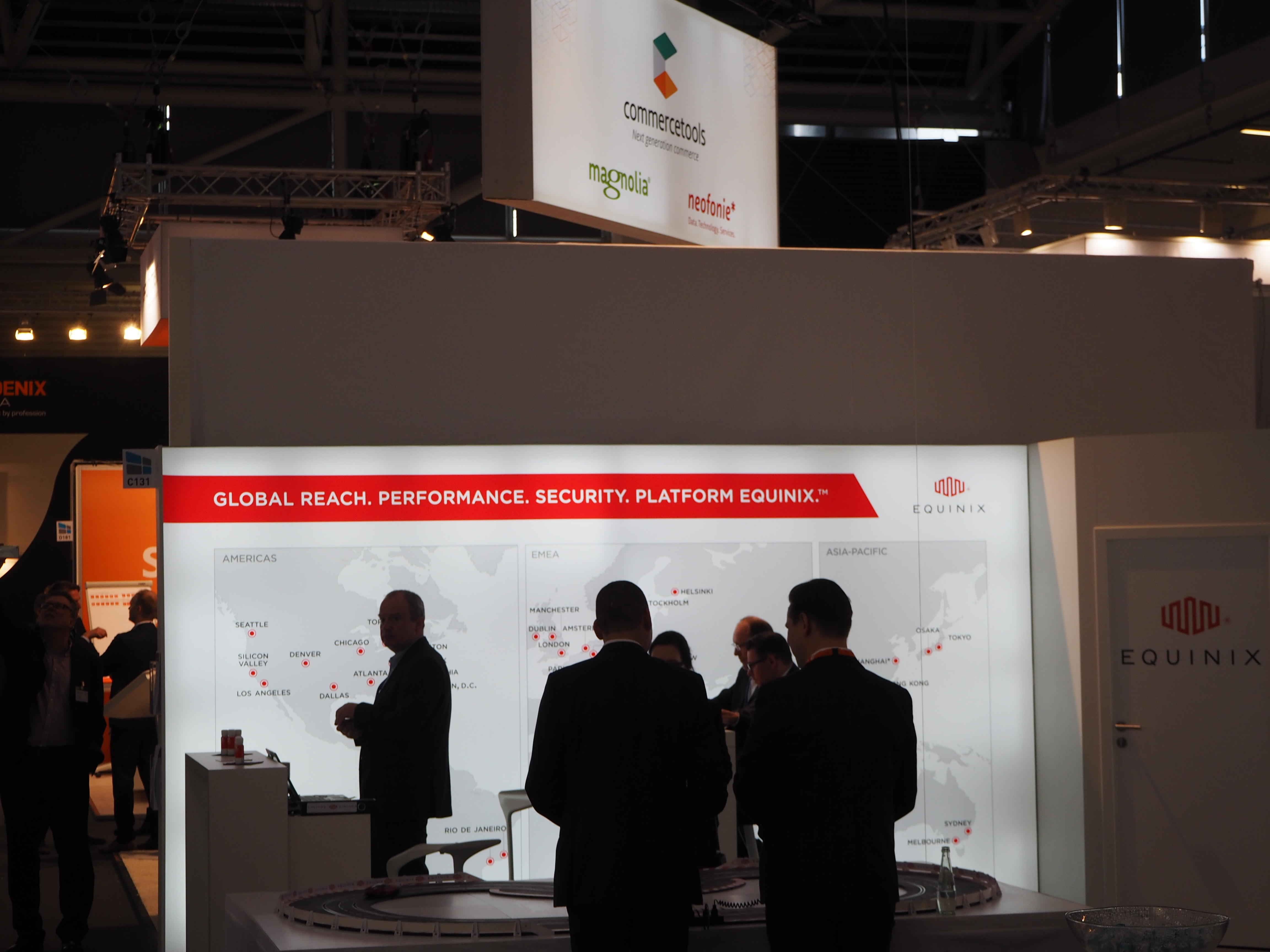 Internet World Fair 2017 in Munich, Germany, Equinix-Stand